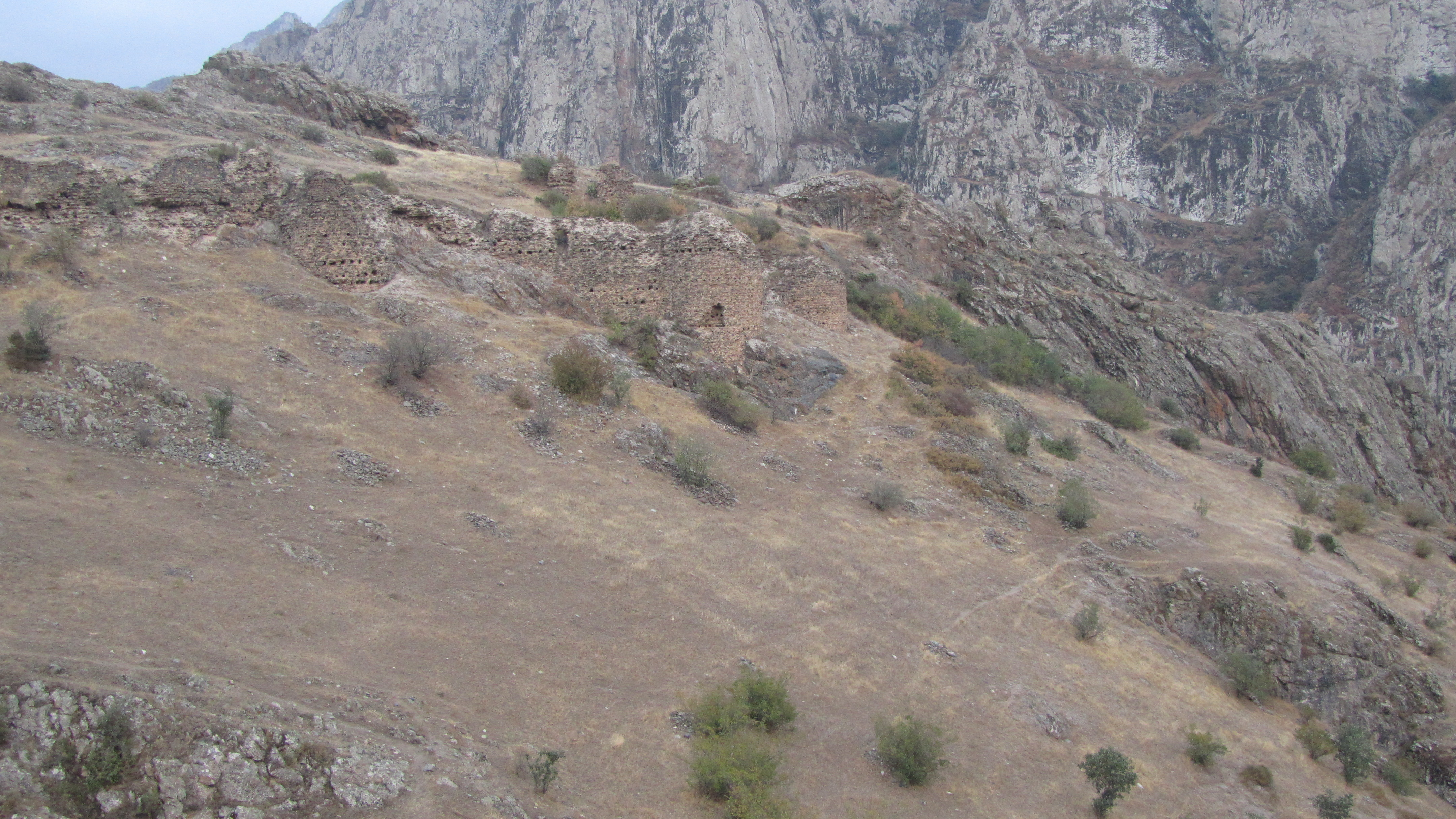 Ամրոց Բաղաբերդ (Դավիթ Բեկի բերդ) - Անդոկավան - քաղաքից ամ, Քաջա­րան տանող մայրուղուց ձախ, Ողջի գետի և նրա ձախ վտակ Գիրաթաղ գետակի միջև, բար­ձունքի վրա - Սյունիքի նշանավոր ամրոցներից էր, կիսավեր 13.1/1